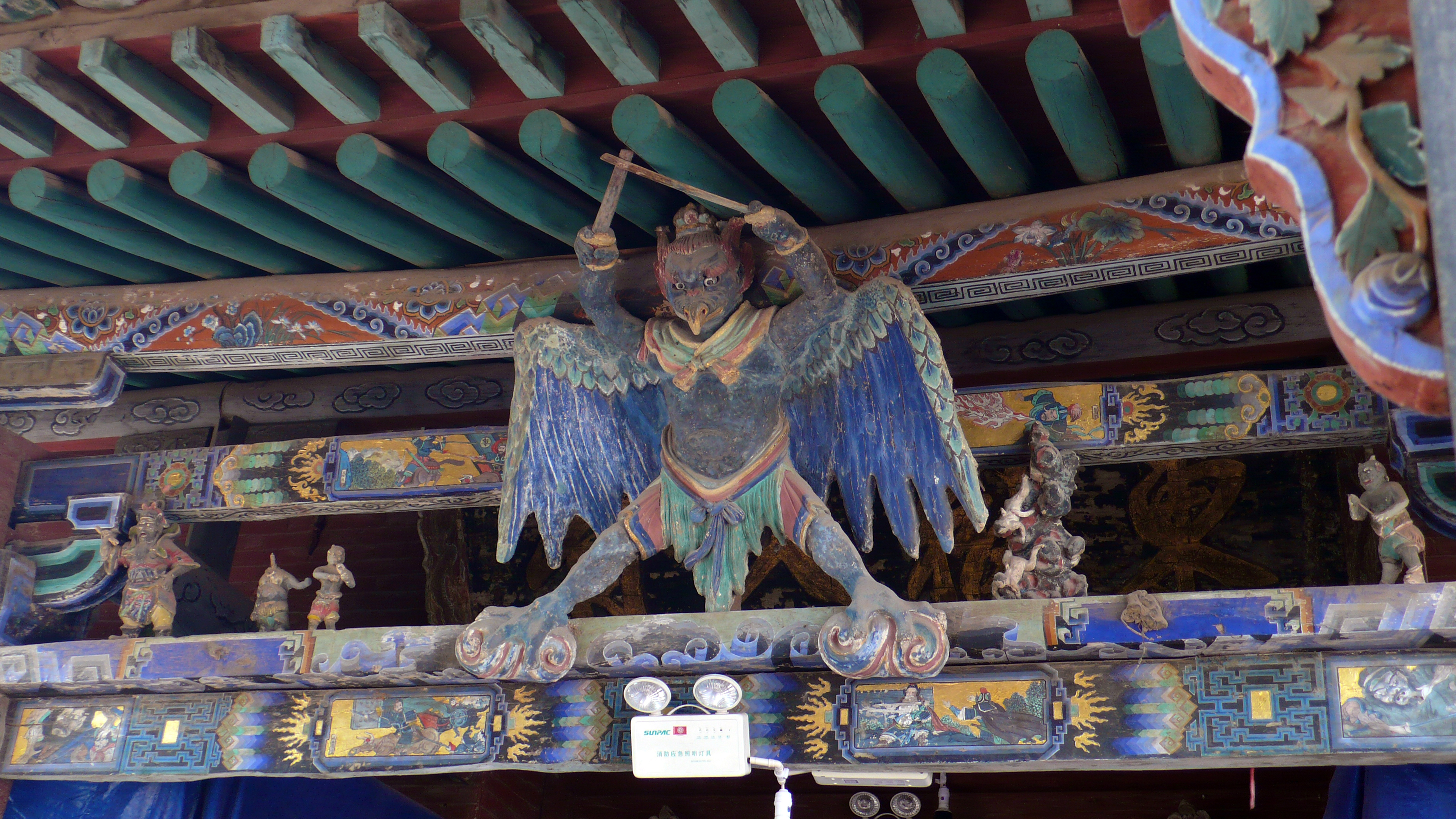 中文（中国大陆）: 柏山东岳庙行宫大殿雕塑。